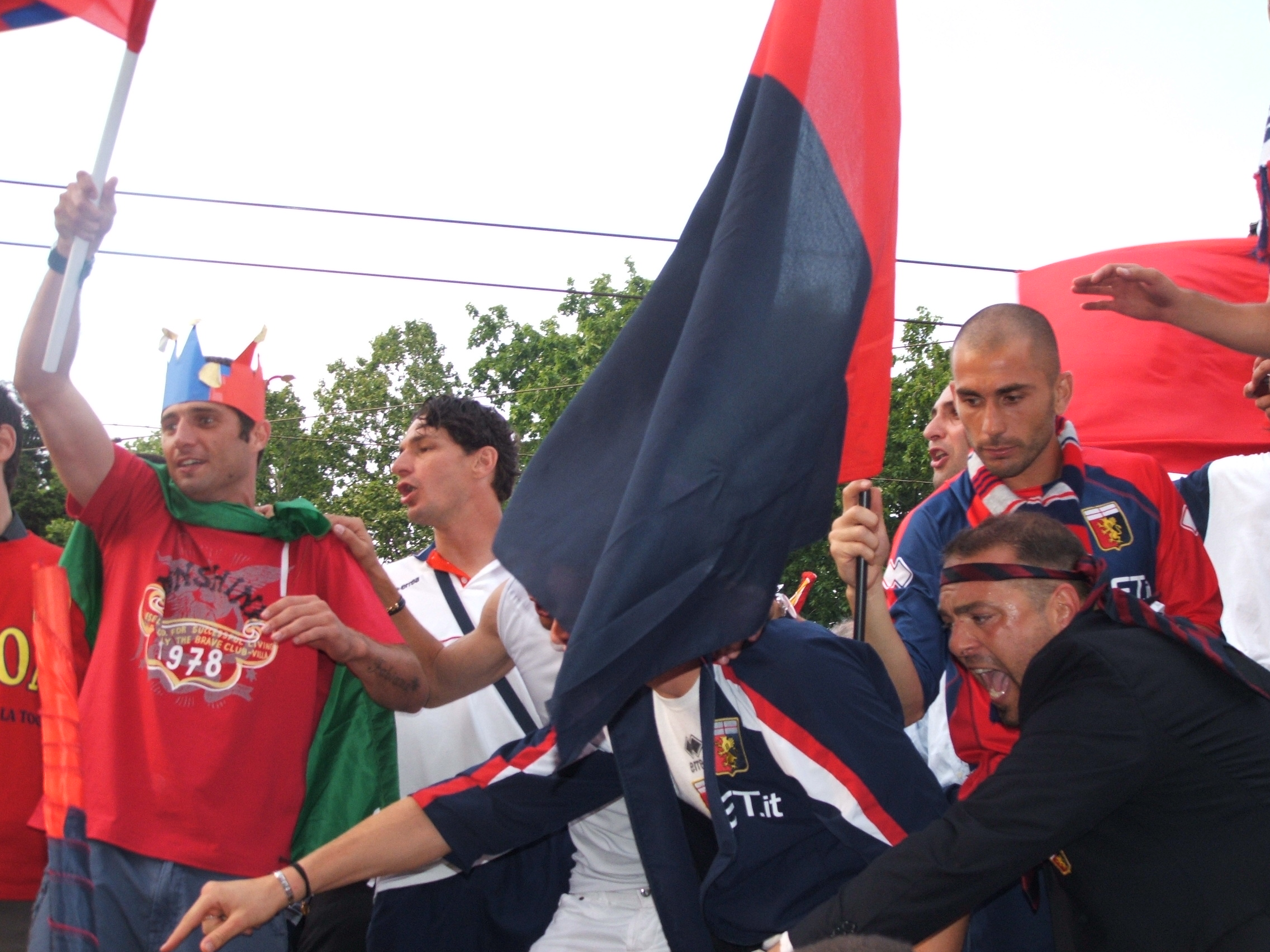 Genova, festeggiamenti per la promozione del Genoa CFC in Serie A